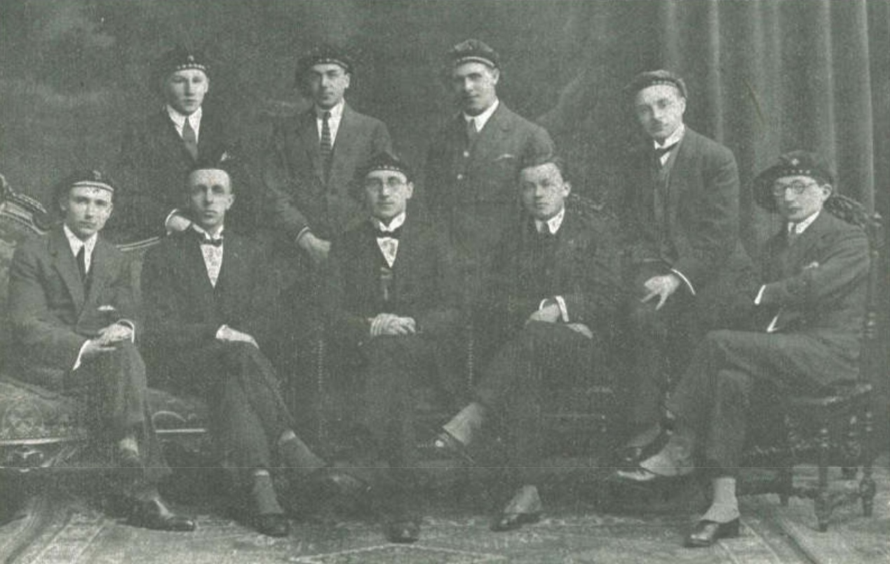 Photo publiée dans Breiz Atao n°78 (juin 1925) intitulée "les nationalistes bretons chez les étudiants flamands de Louvain". Photo souvenir d'une tournée de membres de la revue Breiz Atao en Belgique. de gauche à droite : premier rang : Gérard Romsée, Olier Mordel, Paul Beeckmann, Morvan Marchal, Josef De Vlieger second rang : Tony Herbert, Paul Flamée, Joris Lens, Jos Vermeulen